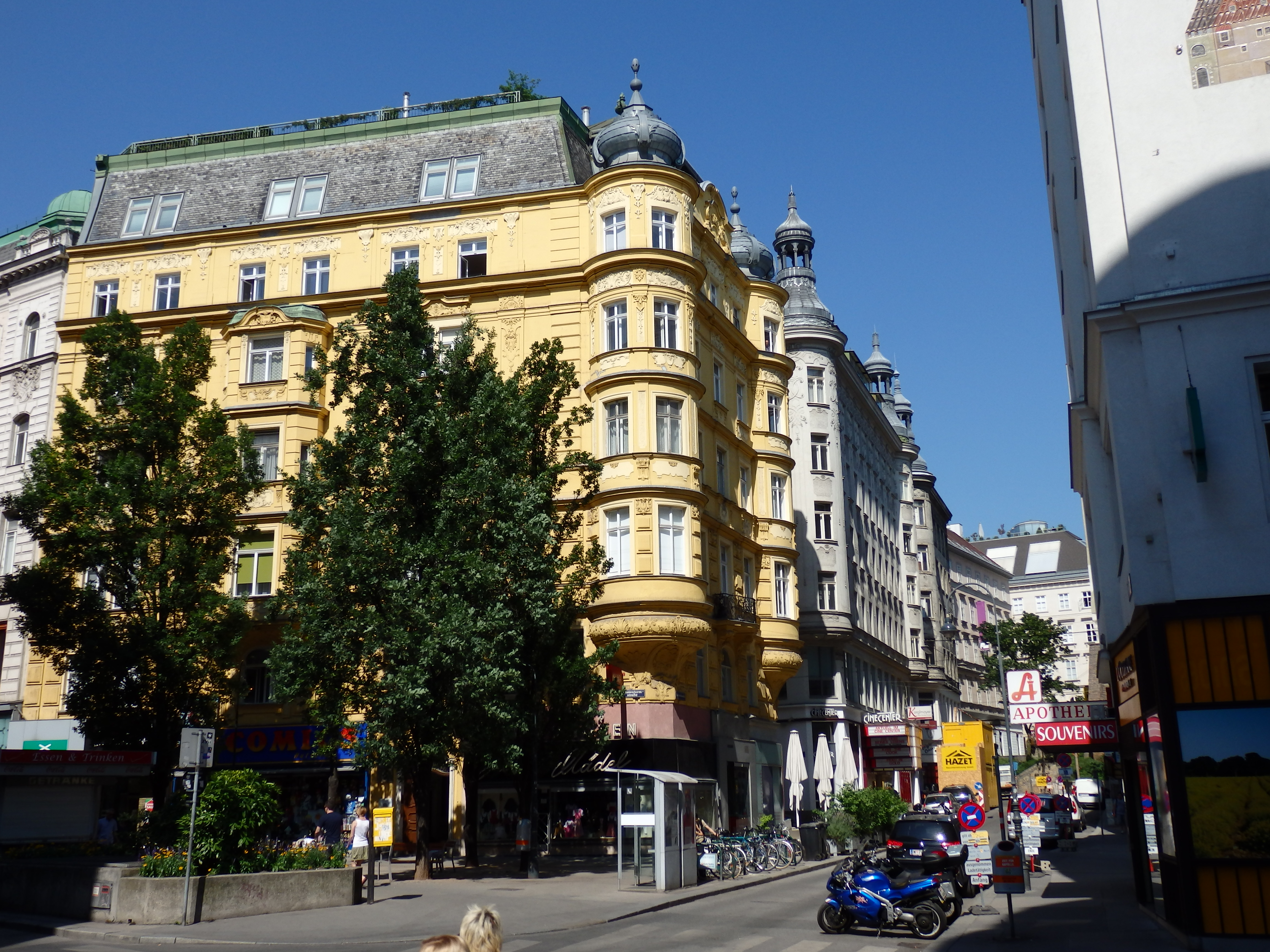 Fleischmarkt von der Rotenturmstraße gegen Westen, Wien-Innere Stadt